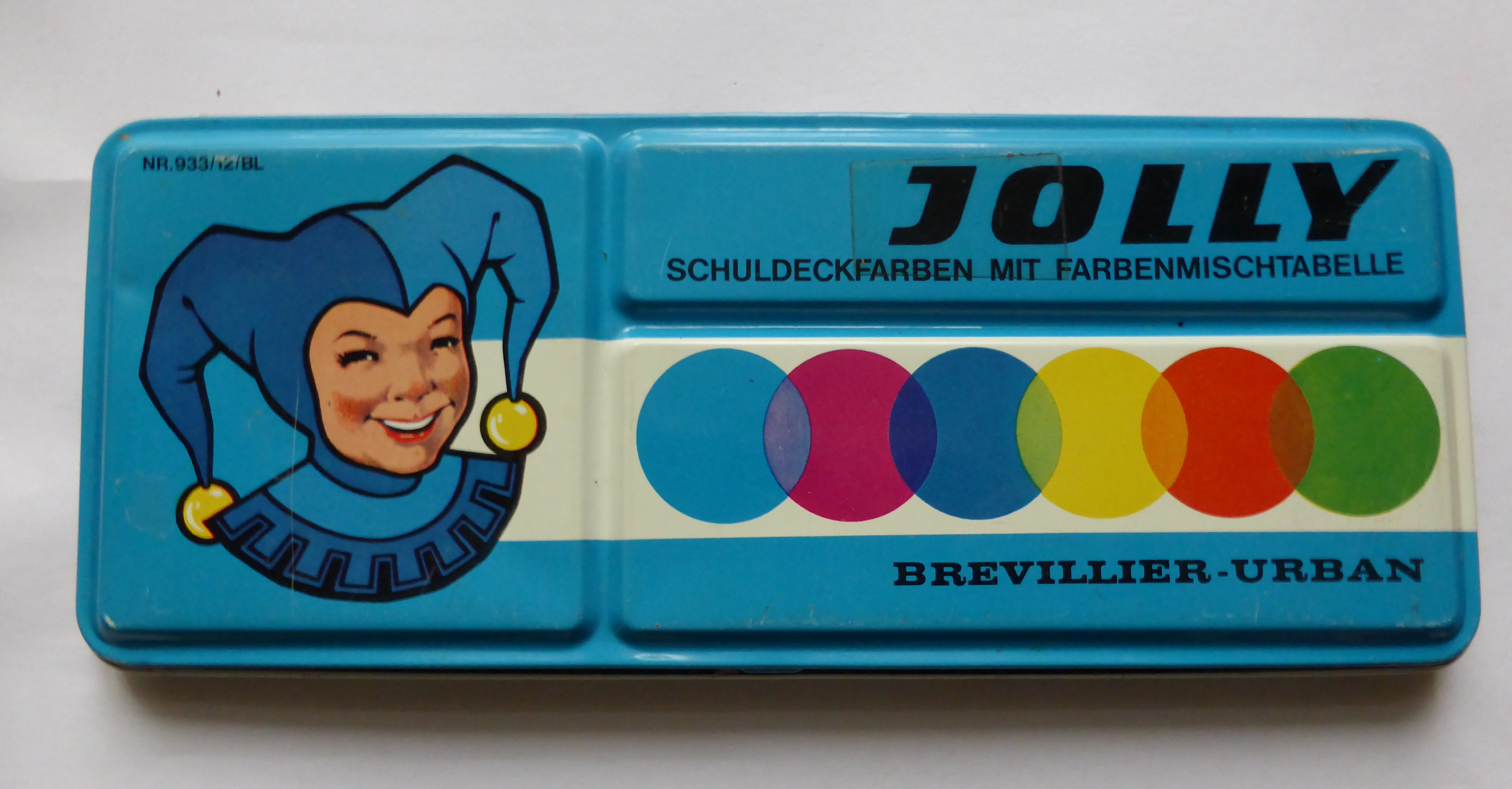 JOLLY SCHULDECKFARBEN MIT FARBMISCHTABELLE von BREVILLIER-URBAN